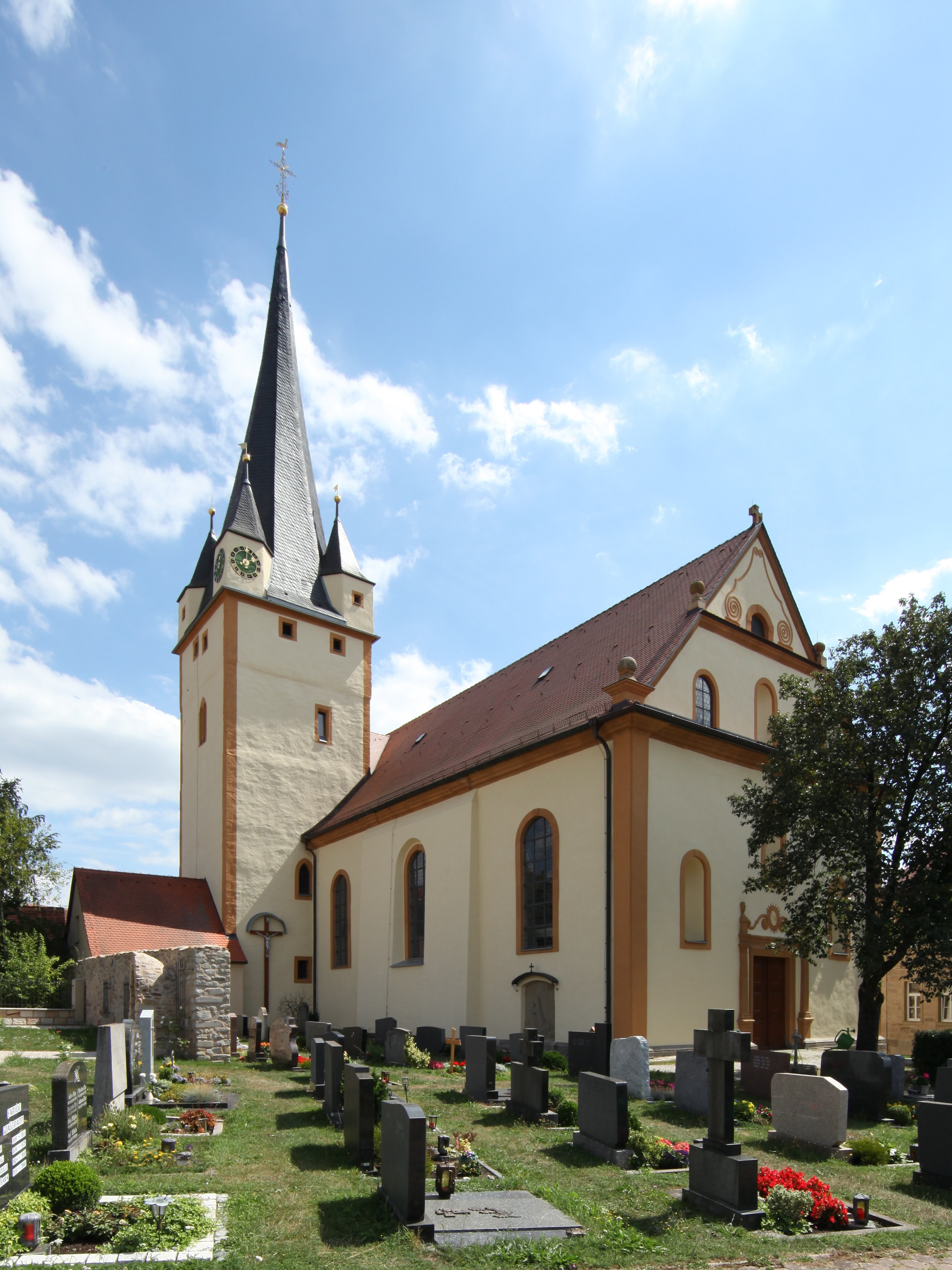 Katholische Pfarrkirche Mariae Himmelfahrt in Stettfeld